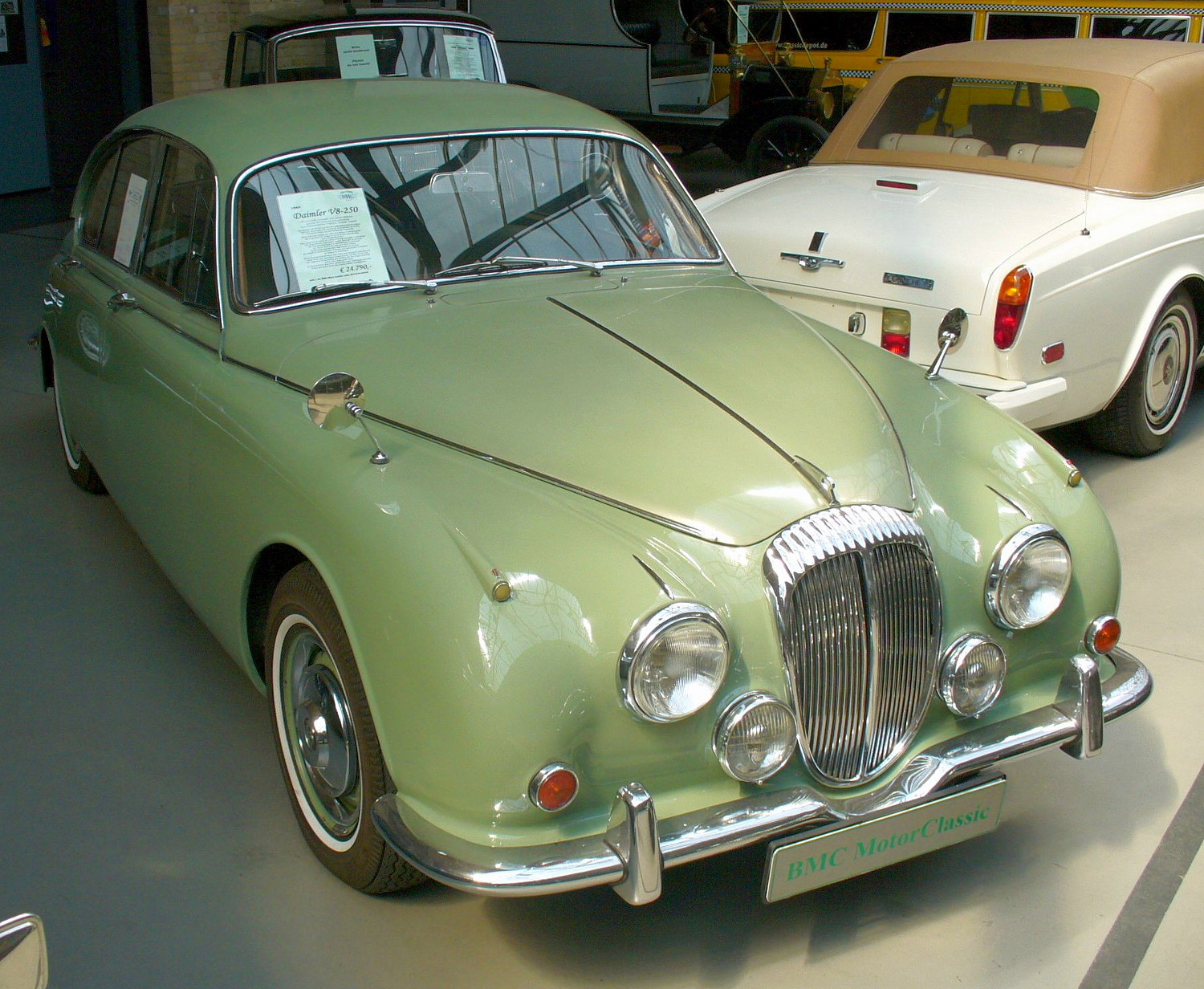 Daimler V8-250